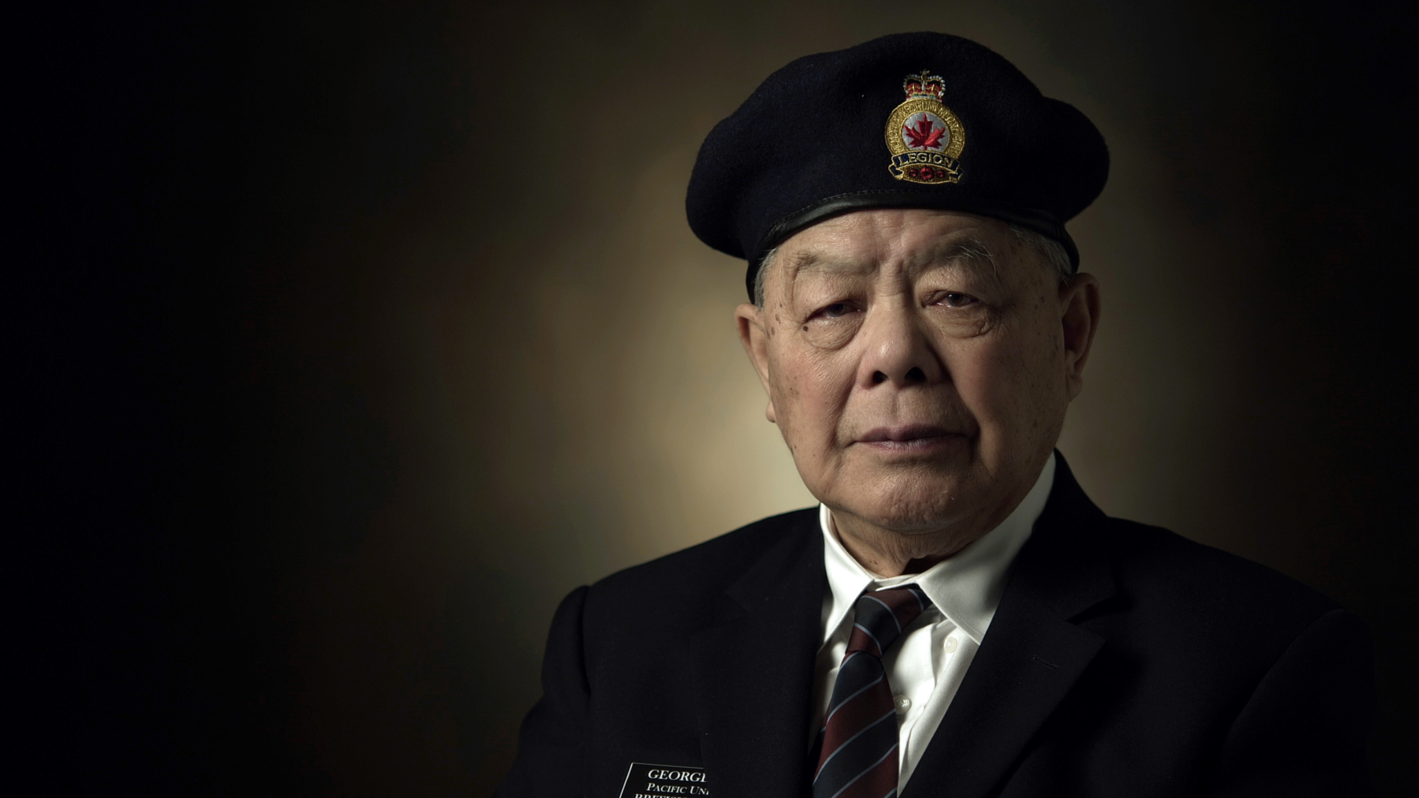 WWII Veteran George Chow